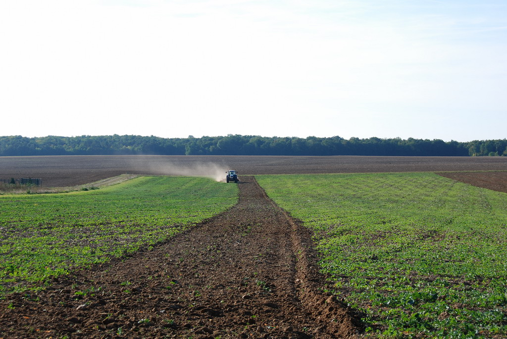 Paysage typique de la Brie